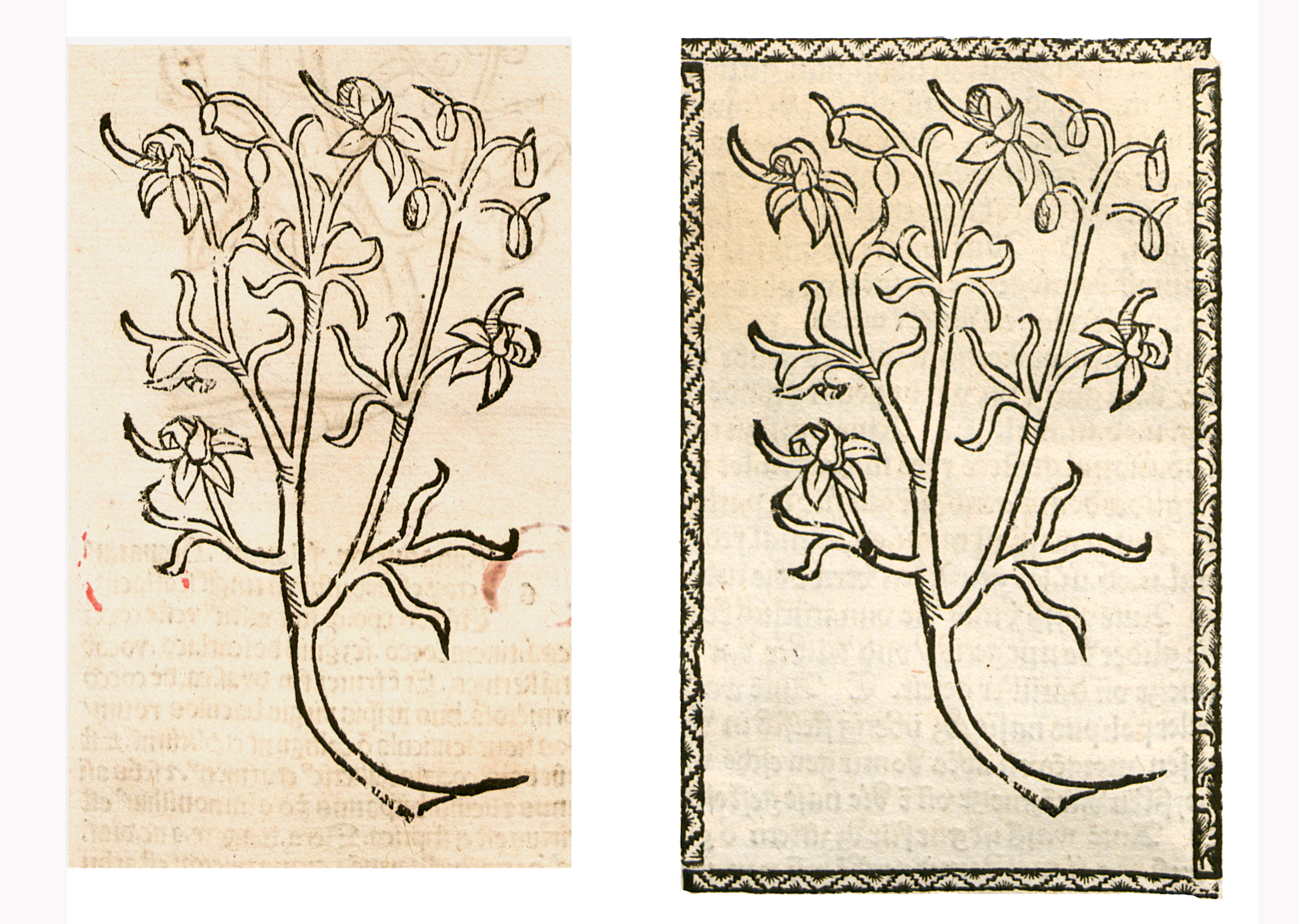 Abbildung von: Ritter Sporn (Consolida regalis)